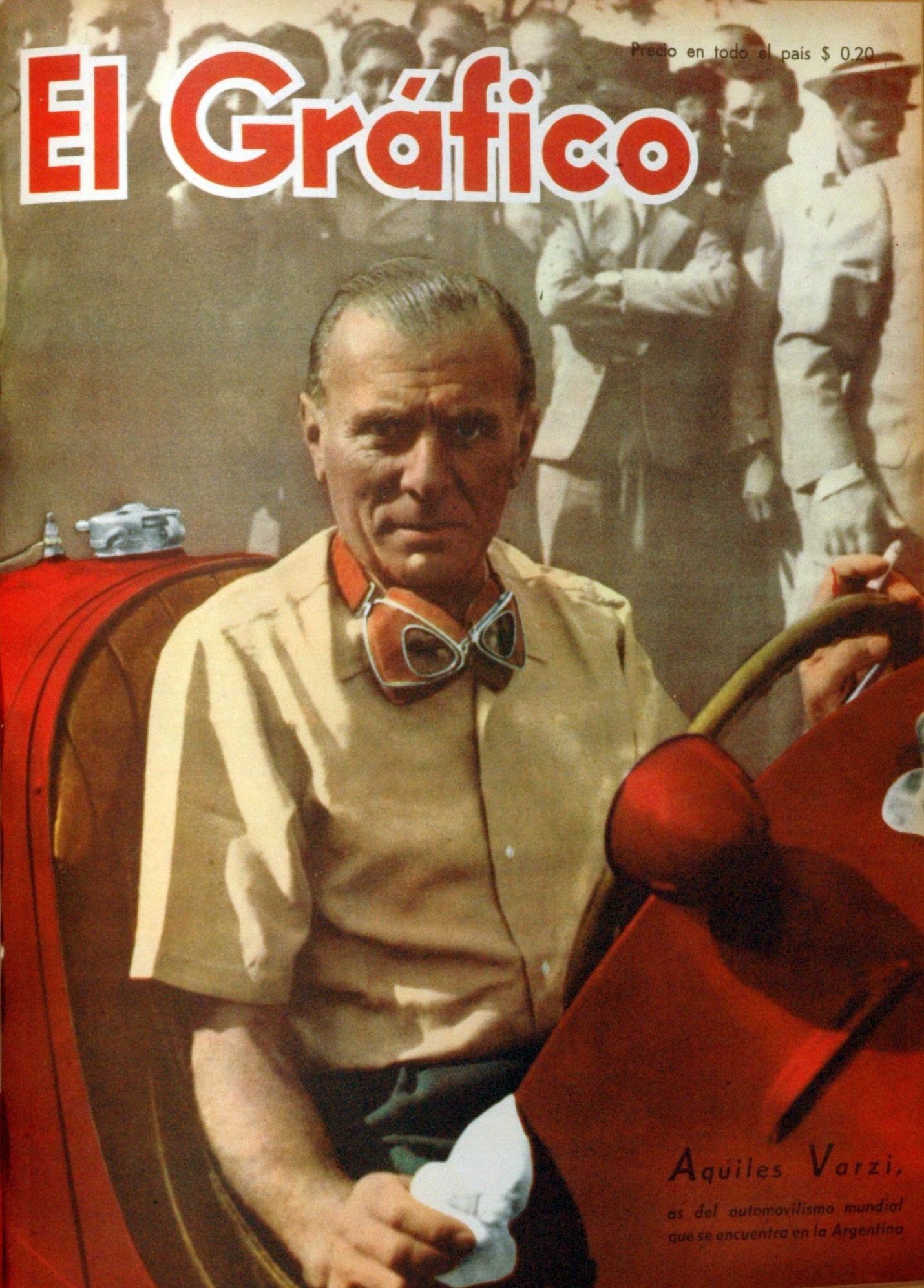 El Grafico del 24 de Enero de 1947. Edicion 1437